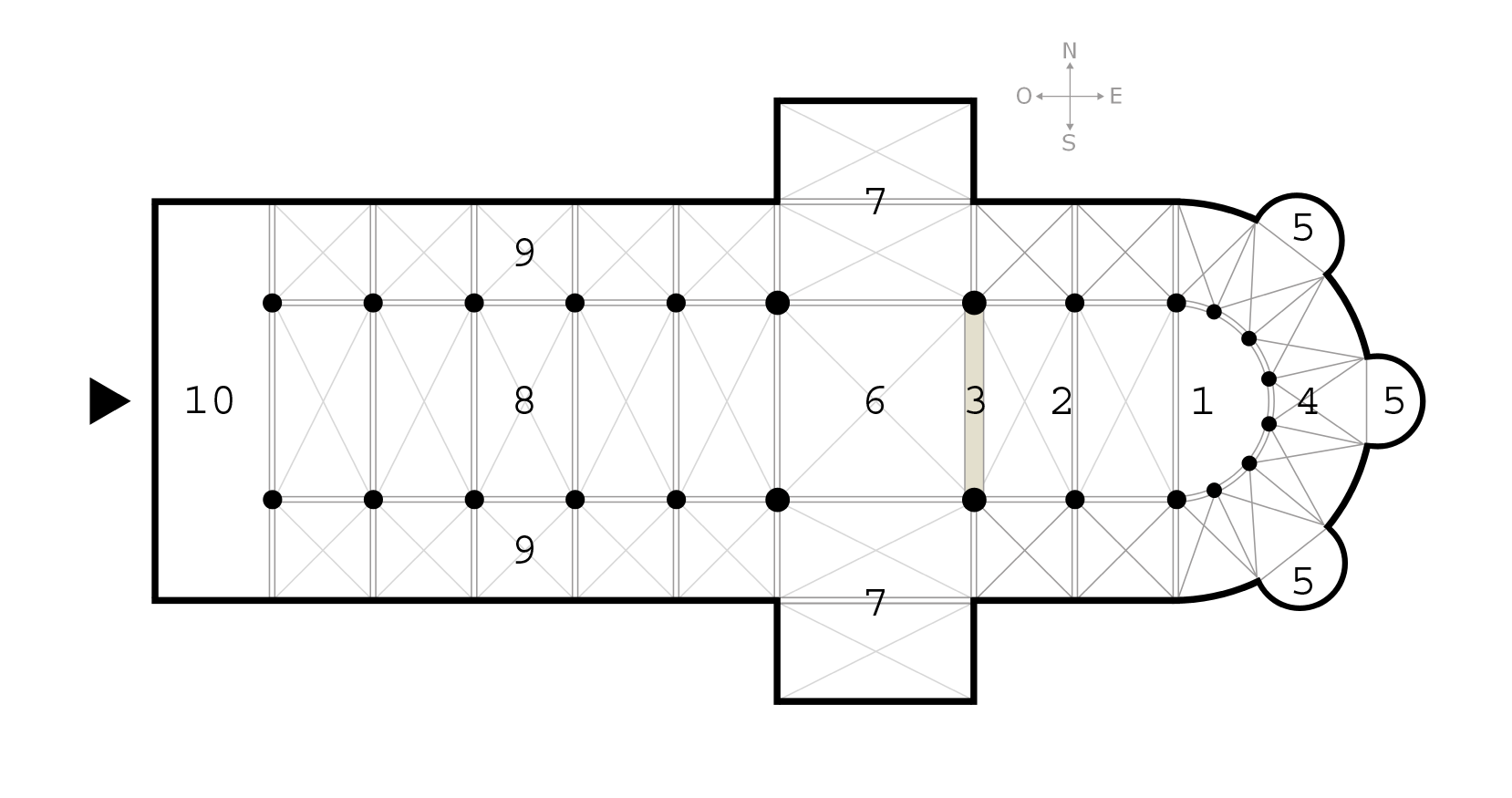 afkomstig van Wikipedia Commons( oorspronkelijke auteur: Lusitana zelf nummers aan toegevoegd